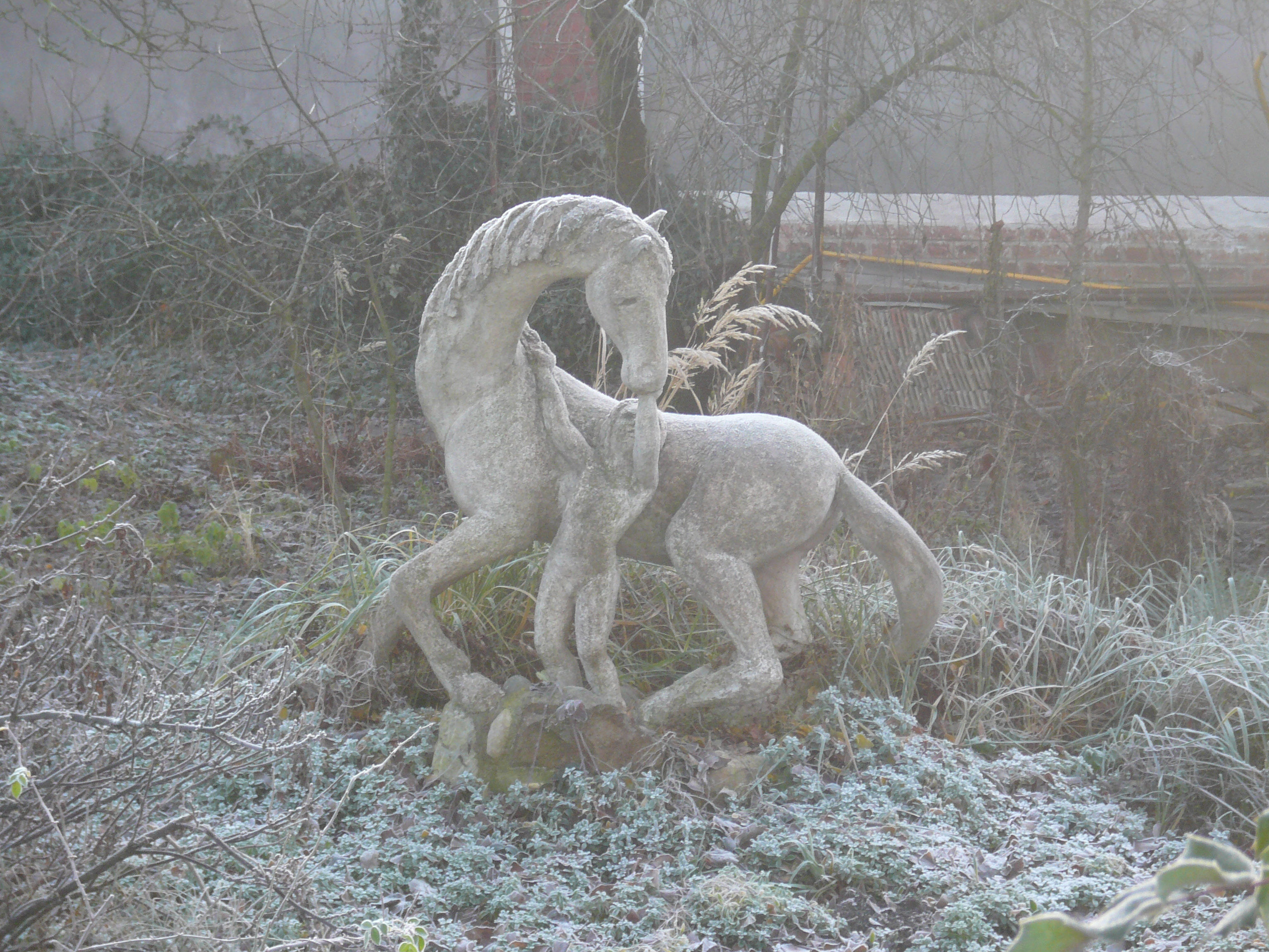 Česky: Socha koně.